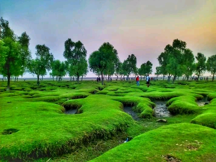 গুলিয়াখালী সমুদ্র সৈকত